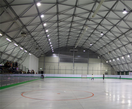 Pattinodromo delle Acquette Via Cartieretta, 1 31100 Treviso (TV)